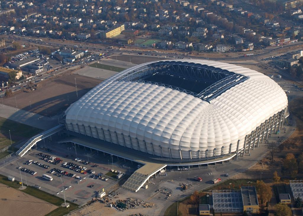 Poznan Stadio